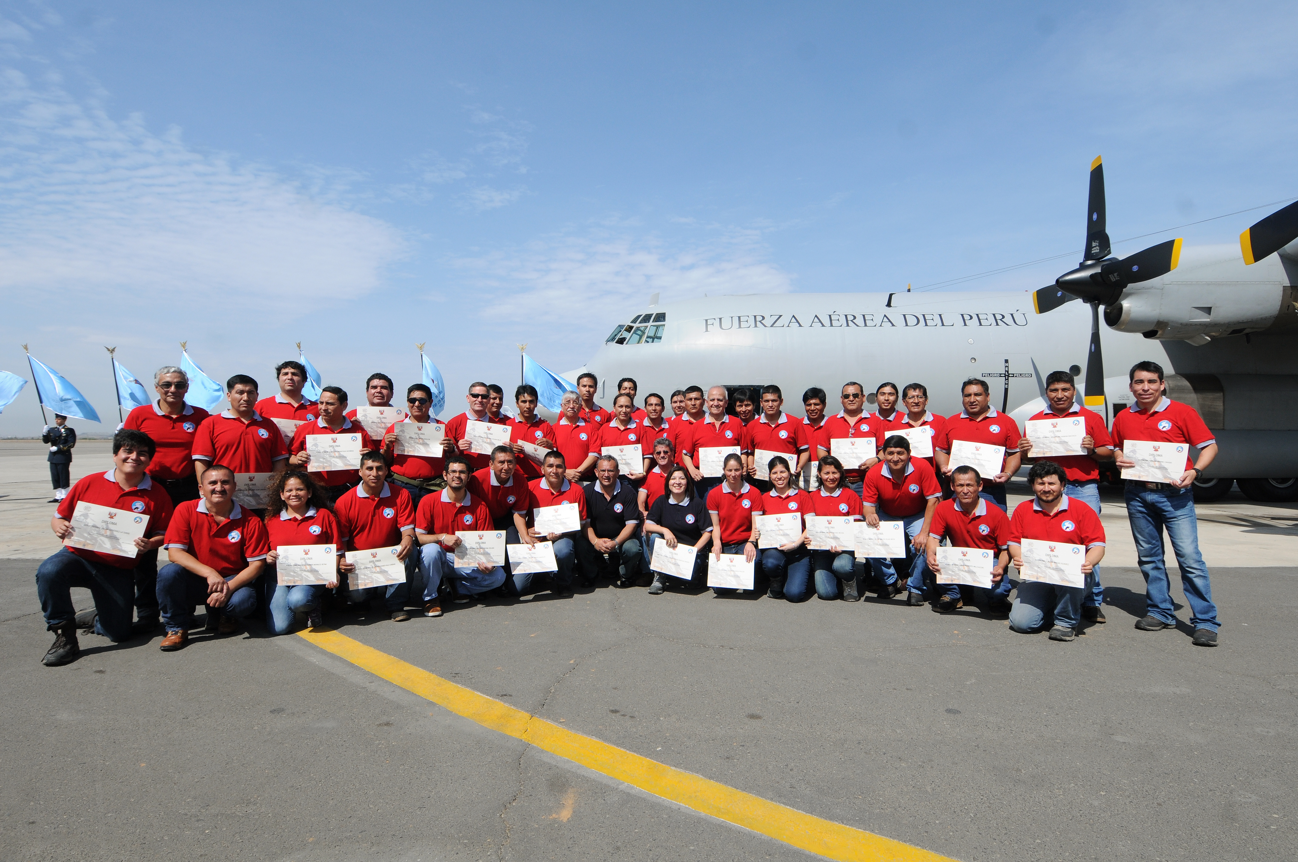 El Canciller, Embajador Gonzalo Gutiérrez Reinel, presidió la bienvenida a los miembros de la XXIII expedición ANTAR, quienes retornan al Perú tras pasar una temporada en la Base Machu Picchu, en la que condujeron diversas investigaciones.